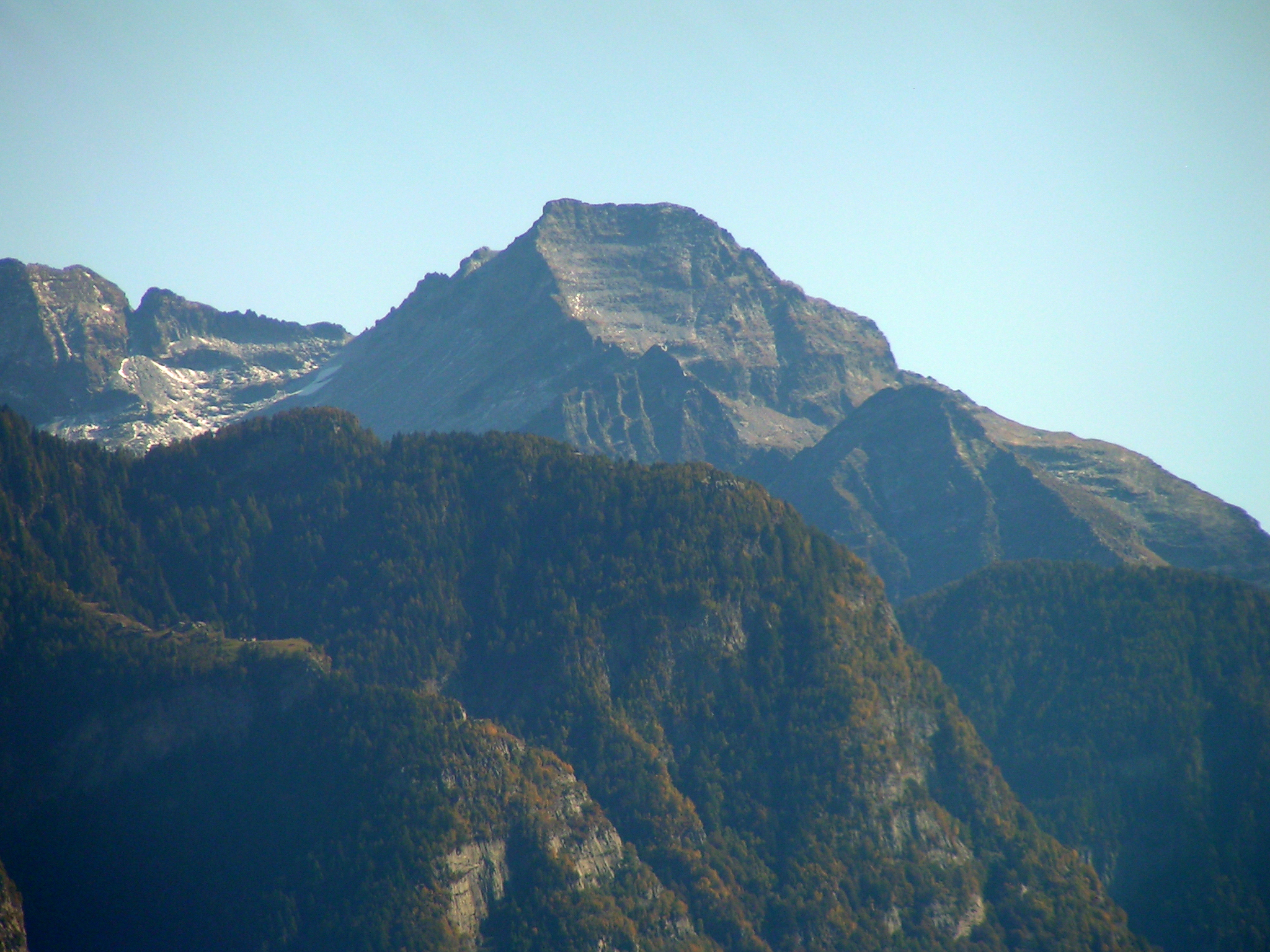 Pizzo di Claro versante nord-ovest visto dalla Bassa Leventina